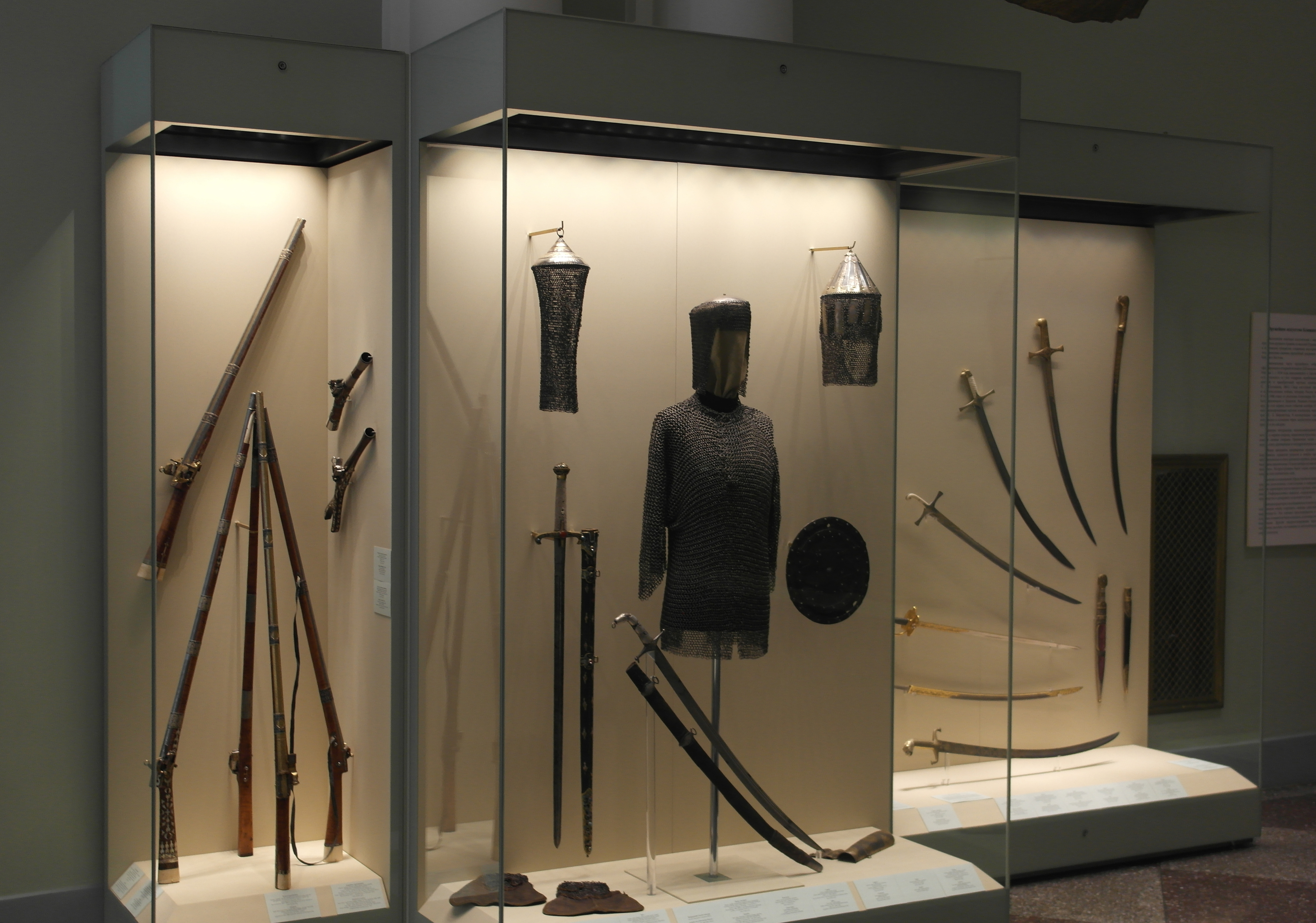 Эрмитаж - Зимний дворец - 1-й этаж - зал 65 - Восточное оружие